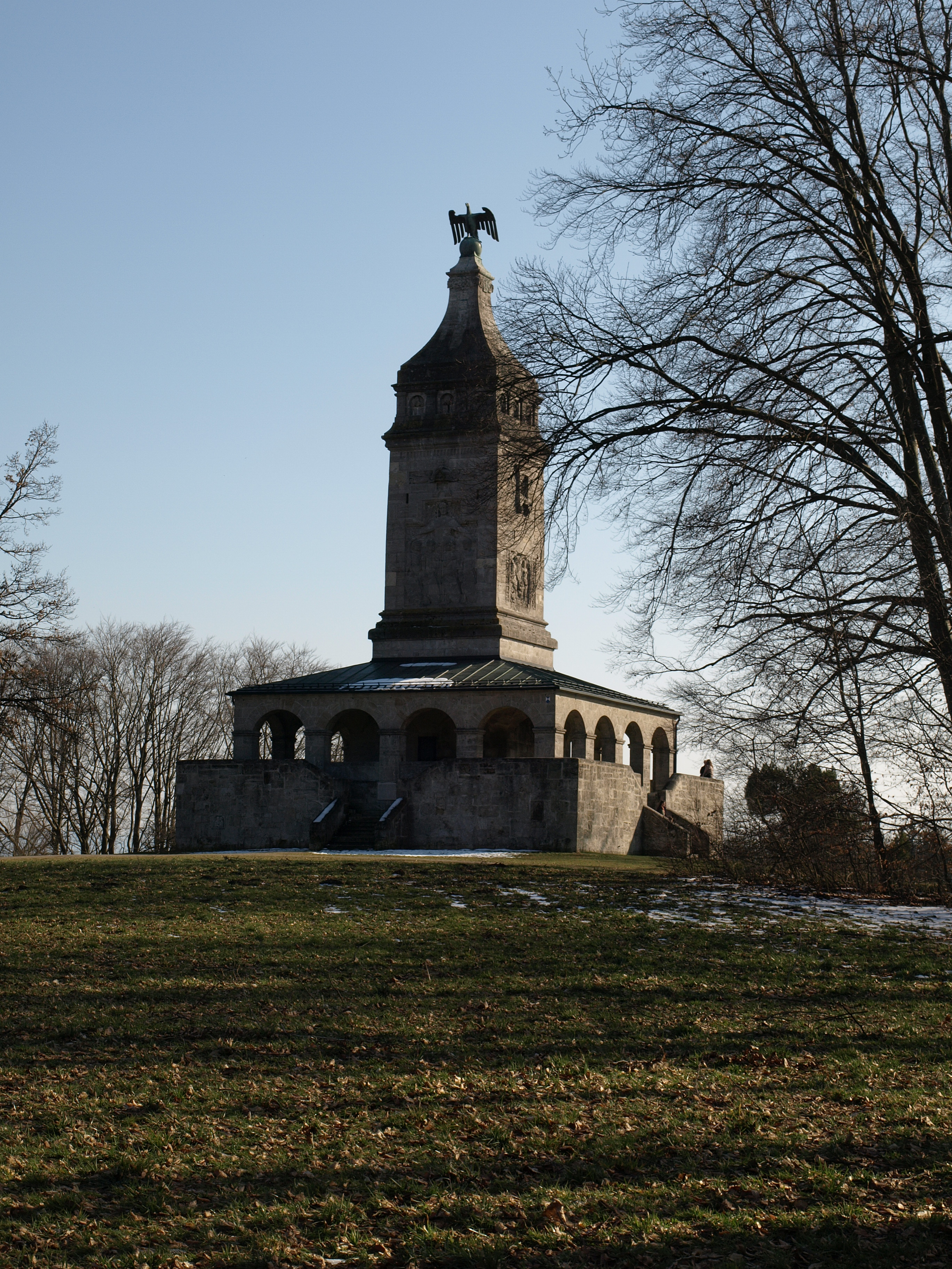 Beschreibung: Bismarck-Turm zwischen Allmanshausen und Assenhausen am Starnberger See